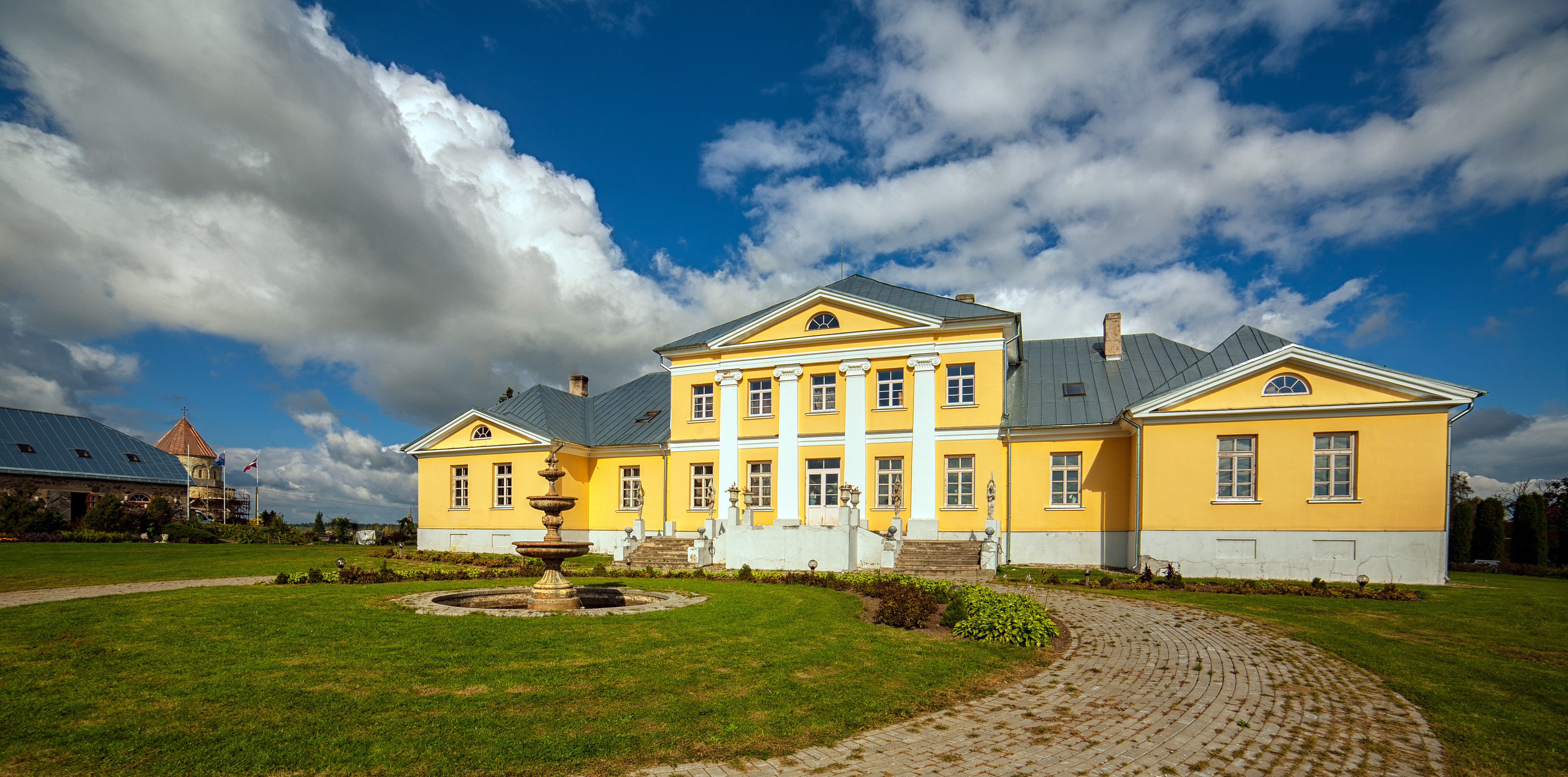 Bruknas muižas apbūve, māj.: "Bruņenieki"